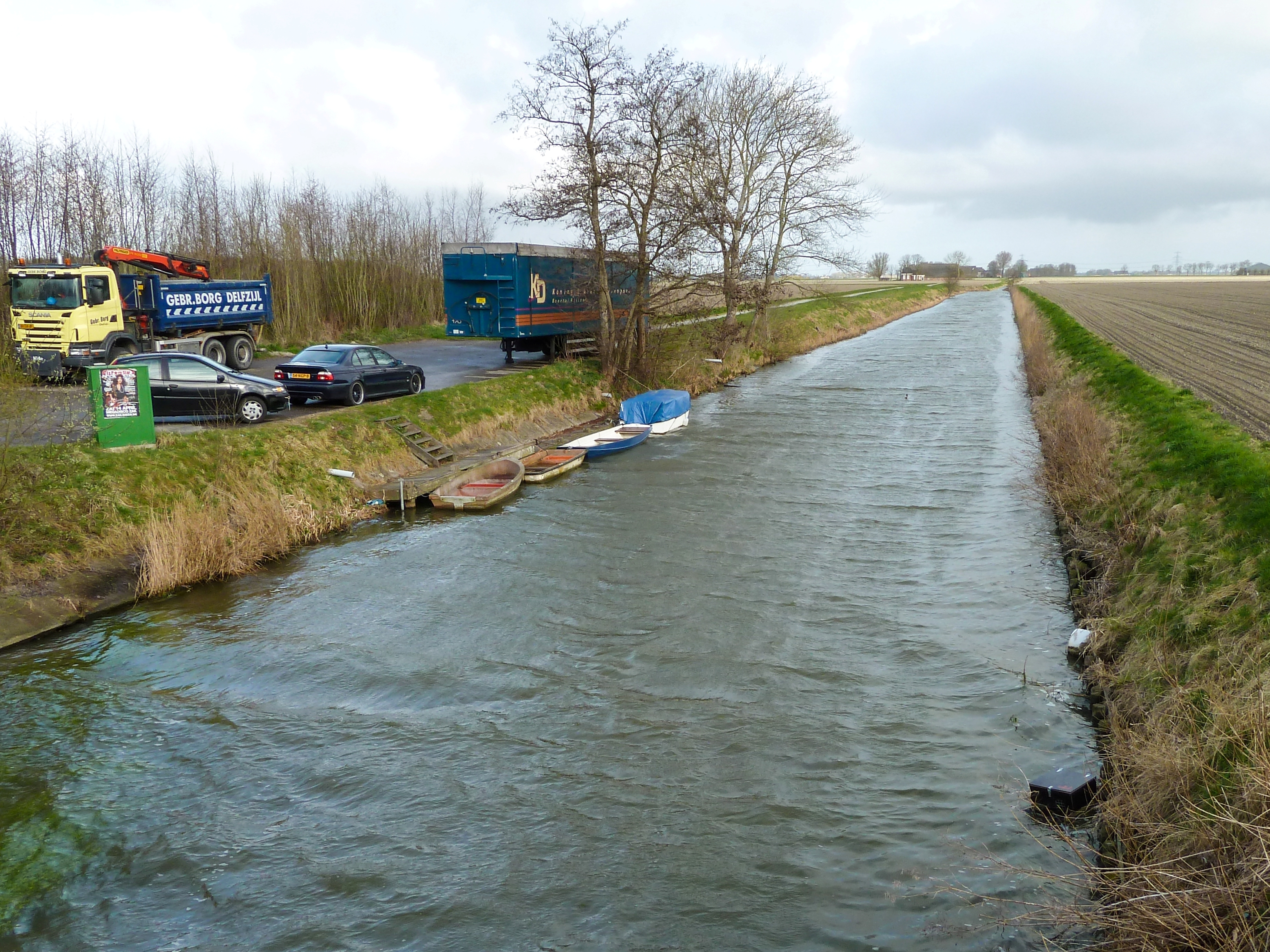 Het Zeerijpermaar bij Zeerijp vanaf de Schippershuistil/Zeerijpertil. Links de opslagplaats, die aangelegd werd in 1976 en nu dienstdoet als parkeerplaats voor vrachtwagens.